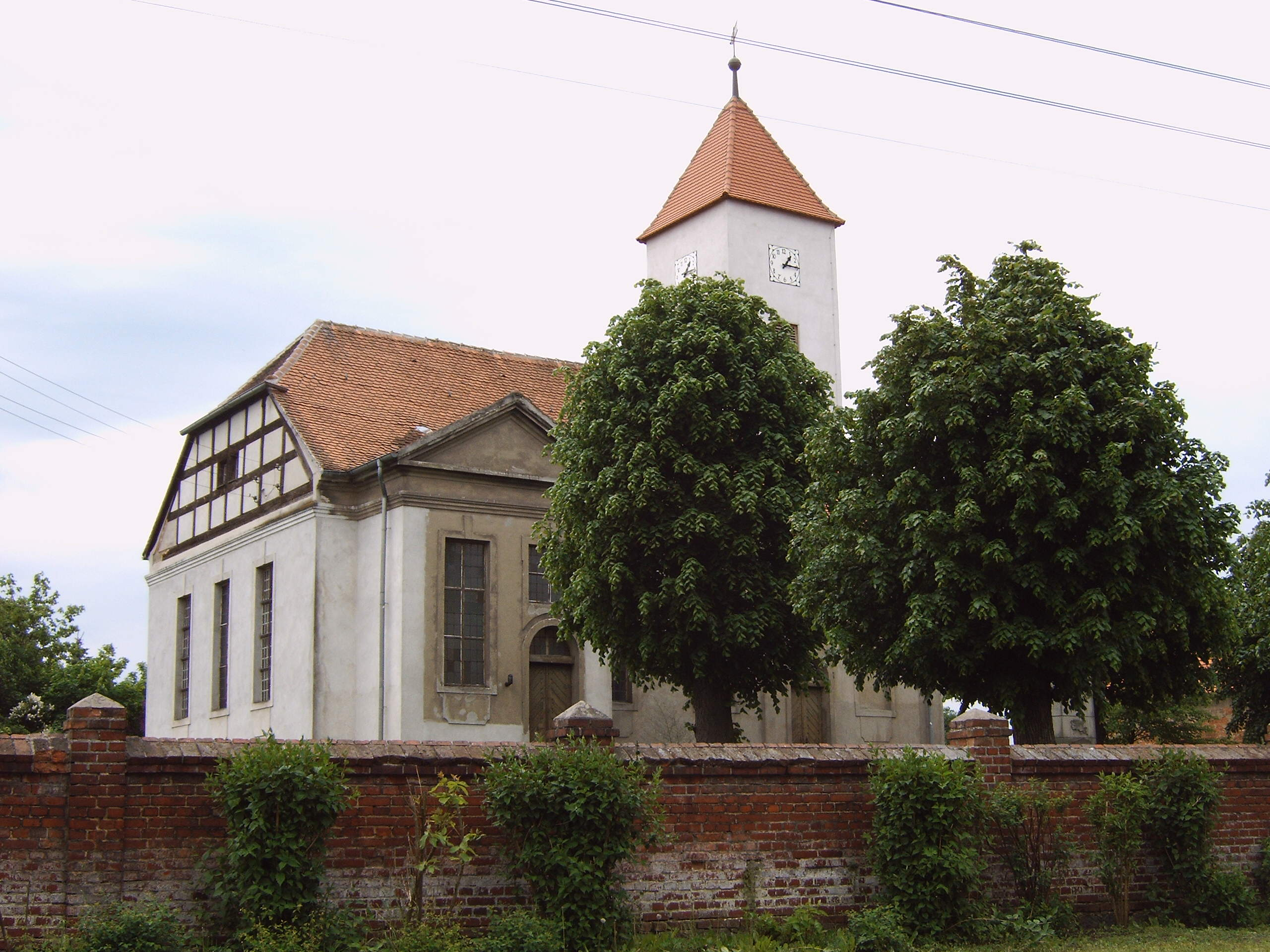 Kirche in Paplitz, Ansicht von der Straße Bild aufgenommen am 22.5.2006 durch Olaf Meister